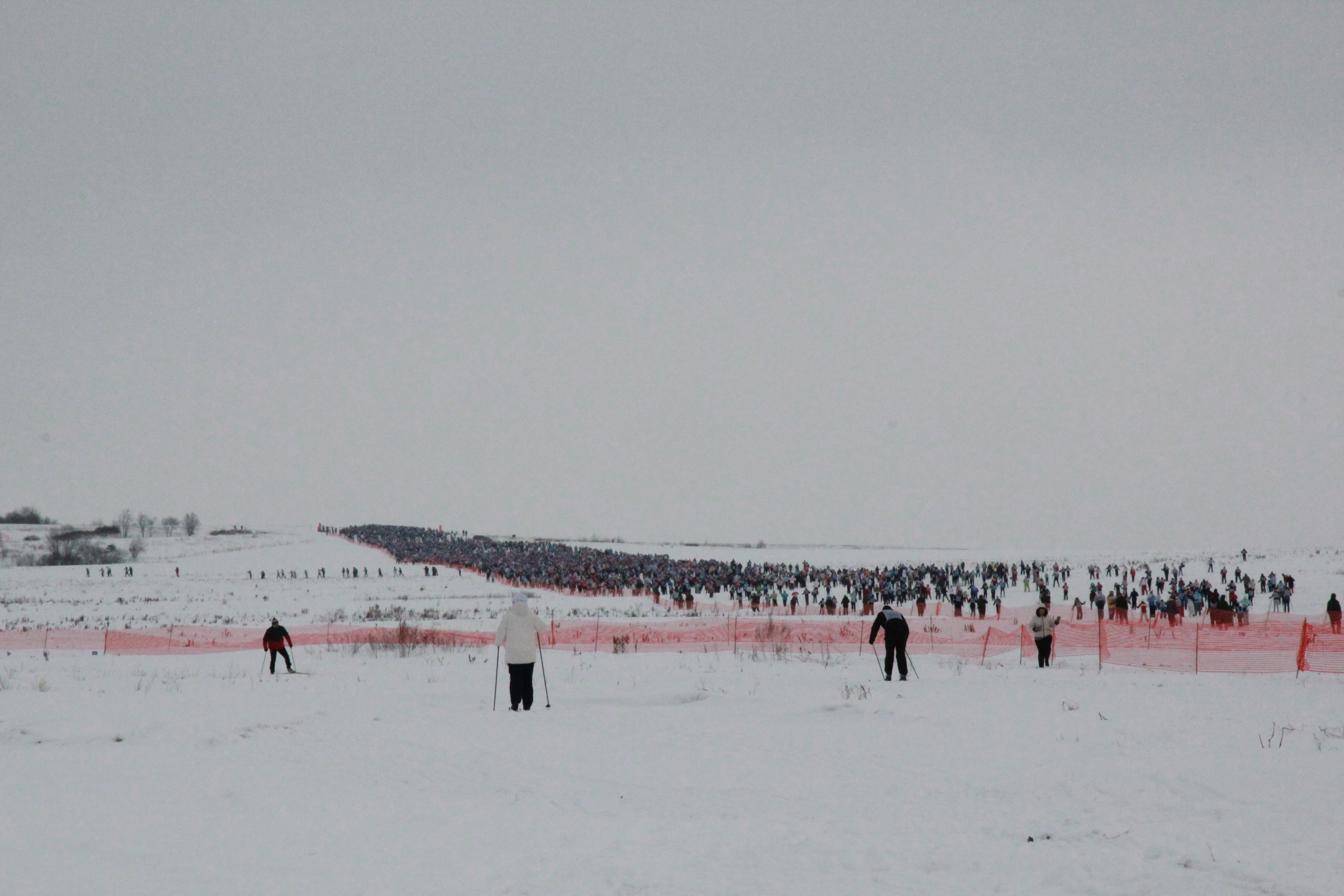 Тууттари парк